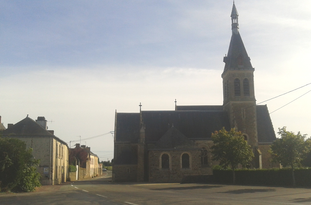 Église Saint-Sixte de La Chapelle-Rainsouin (Inscrit)